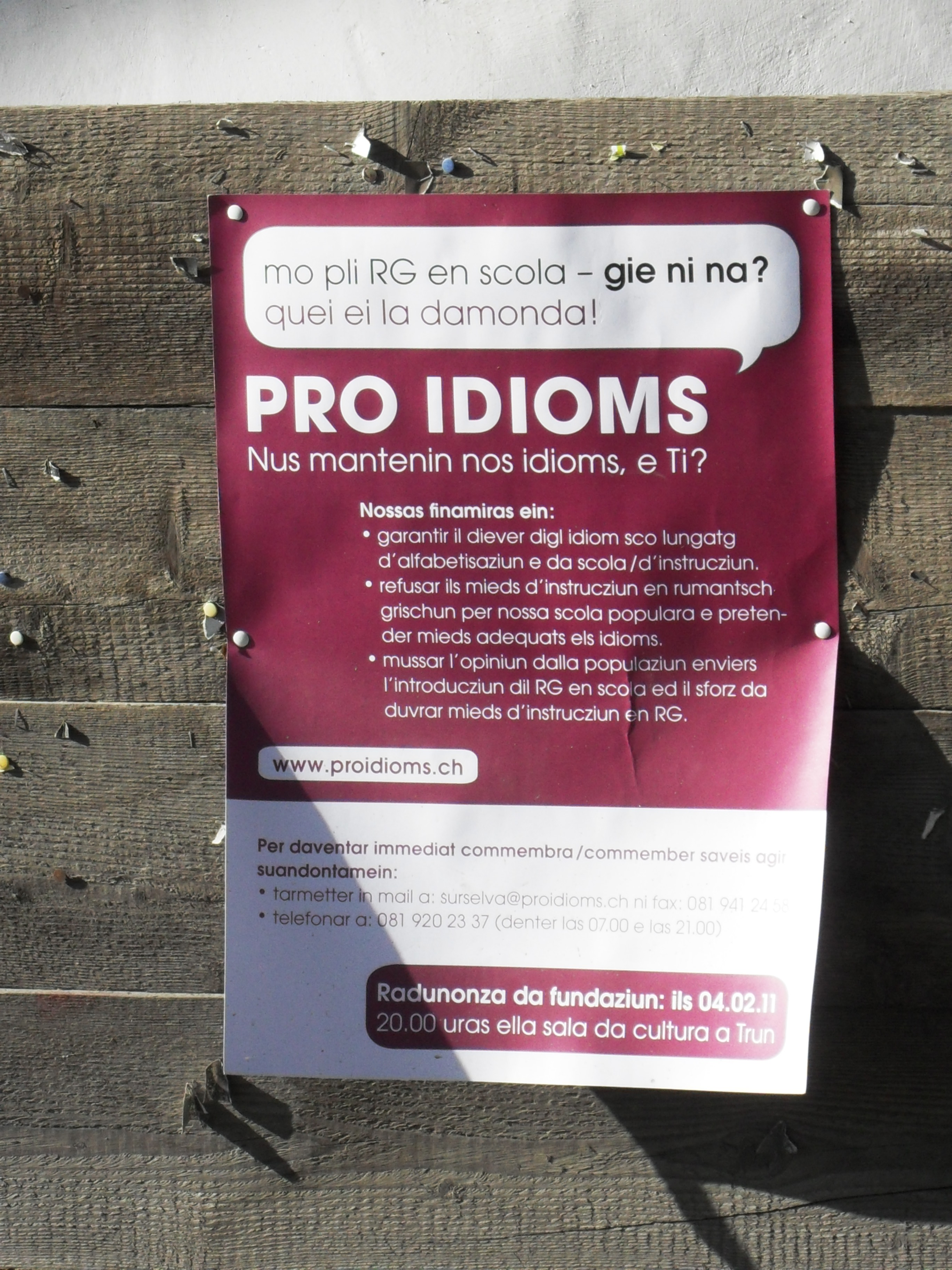 Plakat des Vereins "Pro Idioms" im Februar 2011 in Breil/Brigels.